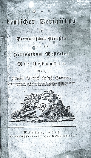 Titelblatt der Schrift „Von deutscher Verfassung“ von Johann Friedrich Joseph Sommer. Münster, 1819